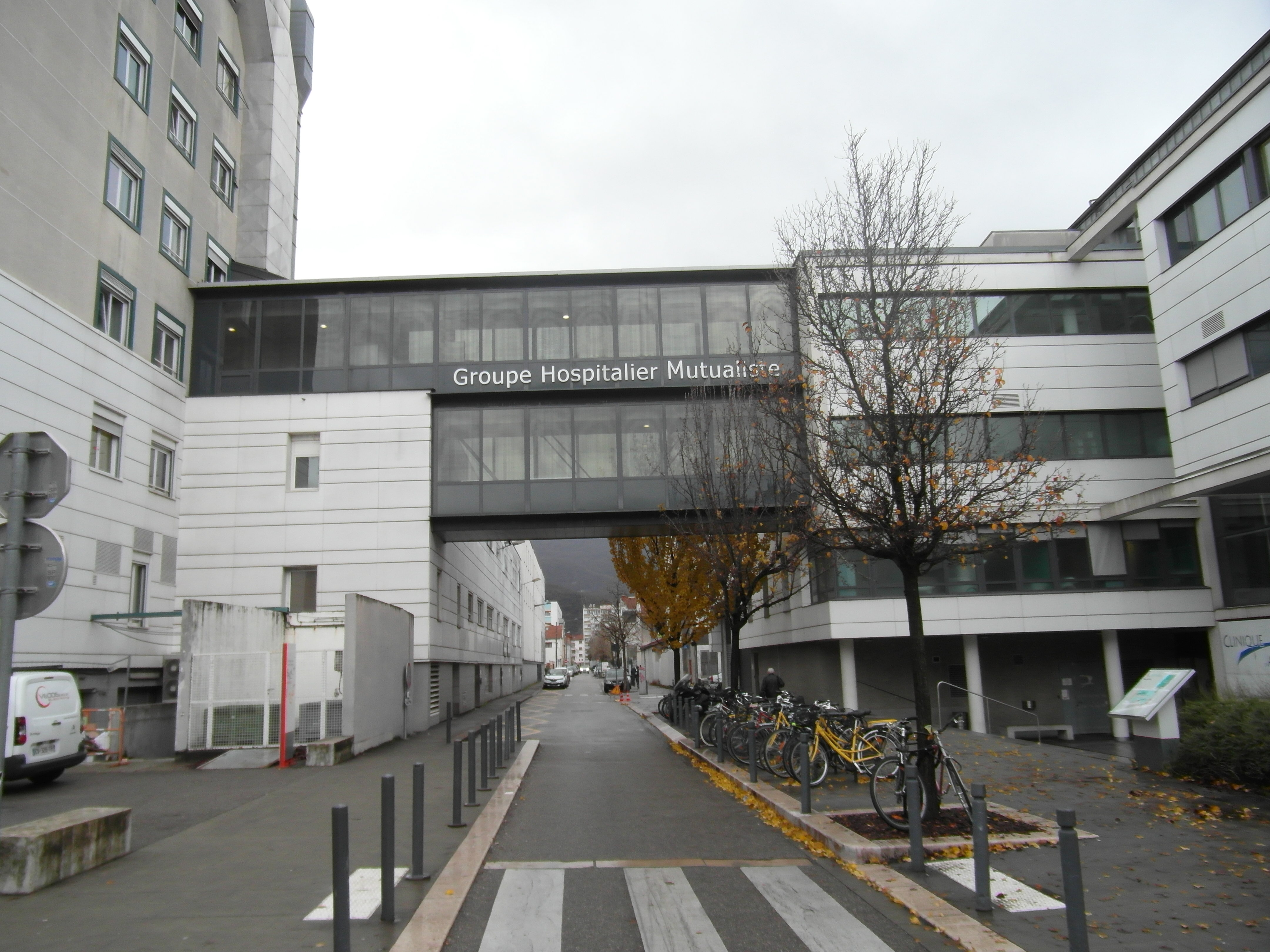 La rue du Dr Hermitte à grenoble